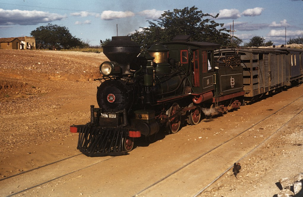 Locomotiva 4-4-0 "American" nº 18 em Paulistana, Piaui. Essa locomotiva foi construída em 1881 pela Baldwin Locomotive Works de Filadélfia, Pensilvânia (EUA), tendo operado em empresas ignoradas até ser adquirida pela Estrada de Ferro Petrolina - Teresina, depois incorporada em 1935 à Viação Férrea Federal do Leste Brasileiro até 1951. Em 1952 a locomotiva nº 18 foi transferida para a Estrada de Ferro Central do Piauí. Foi retirada de serviço na década de 1960.